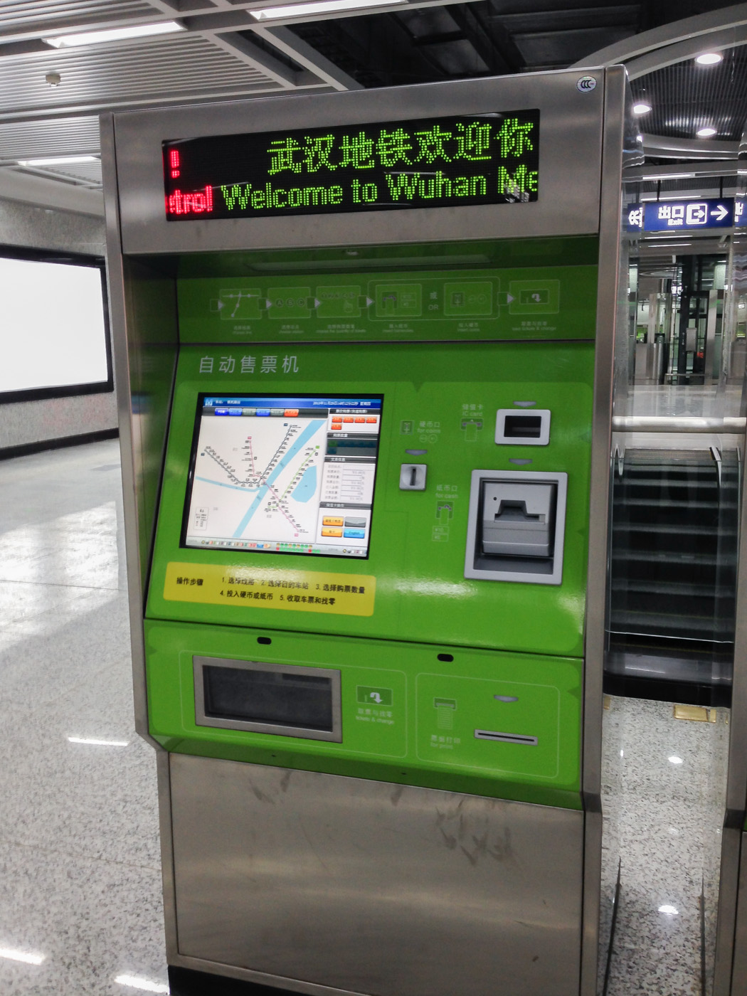 中文（中国大陆）: 武汉地铁4号线自动售票机